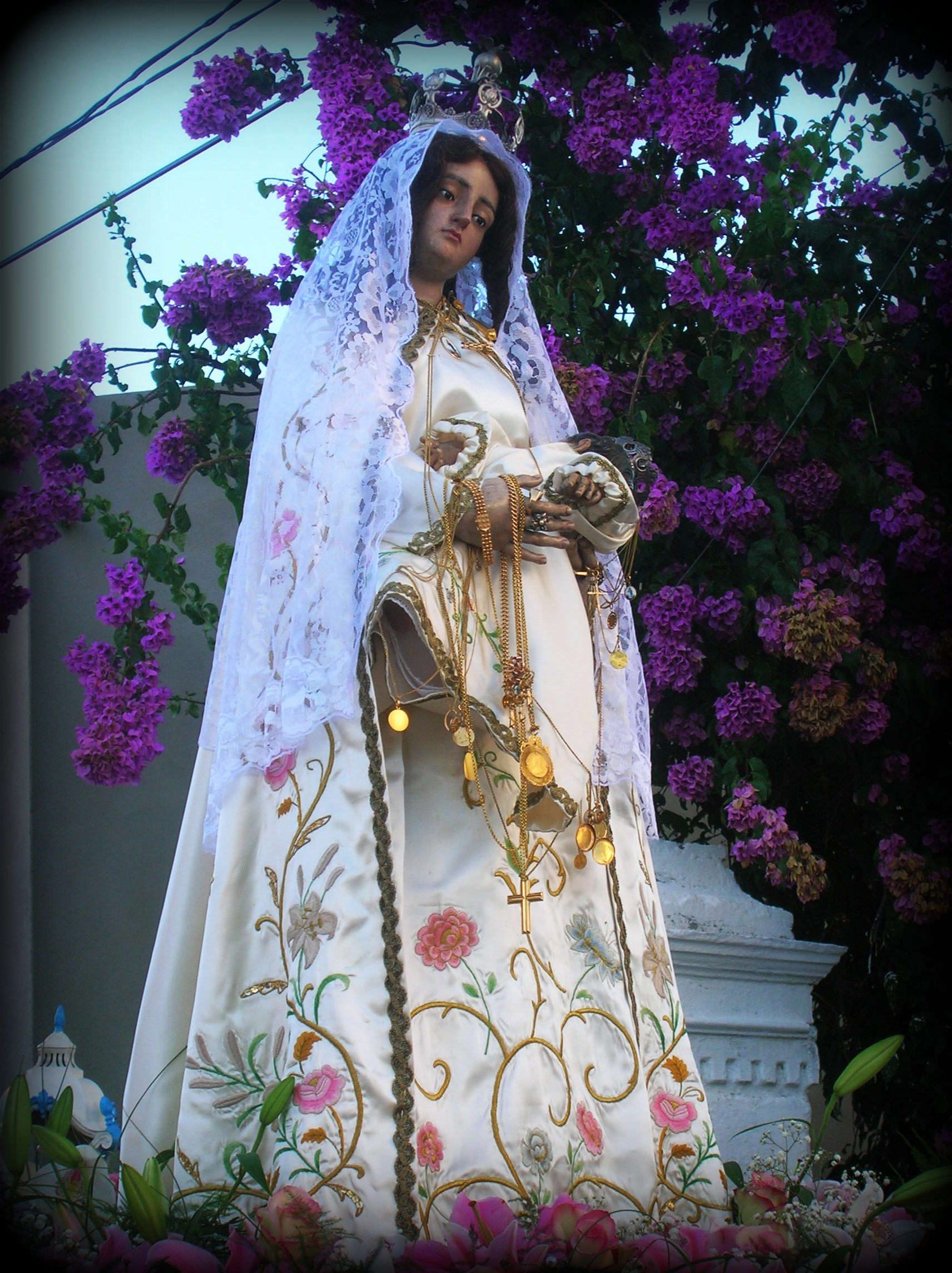 Imagem vestida segundo o gosto das zeladoras atuais (2012) envergando uma cópia recente do fato de matiz, durante a procissão do ano citado.